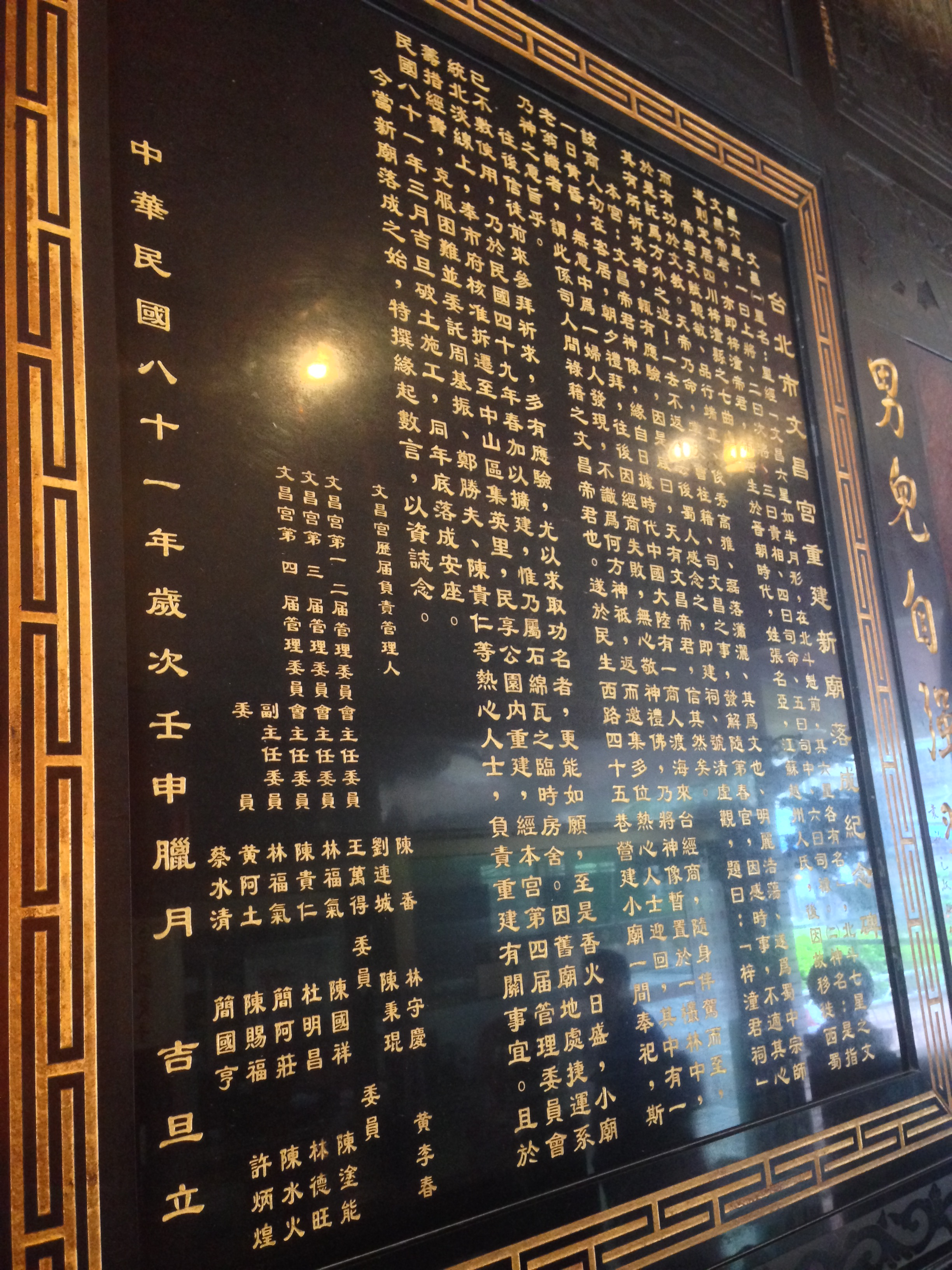 中文（台灣）: 台北市文昌宮沿革